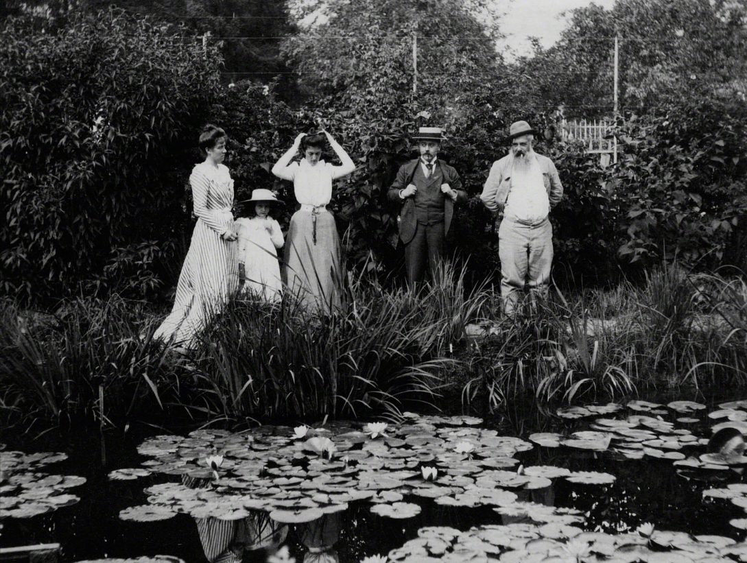 Germaine Hoschedé, Lili Butler, Mme Joseph Durand-Ruel, Georges Durand-Ruel et Claude Monet à Giverny en 1900. Photographie probablement de Joseph Durand-Ruel. Archives Durand-Ruel.